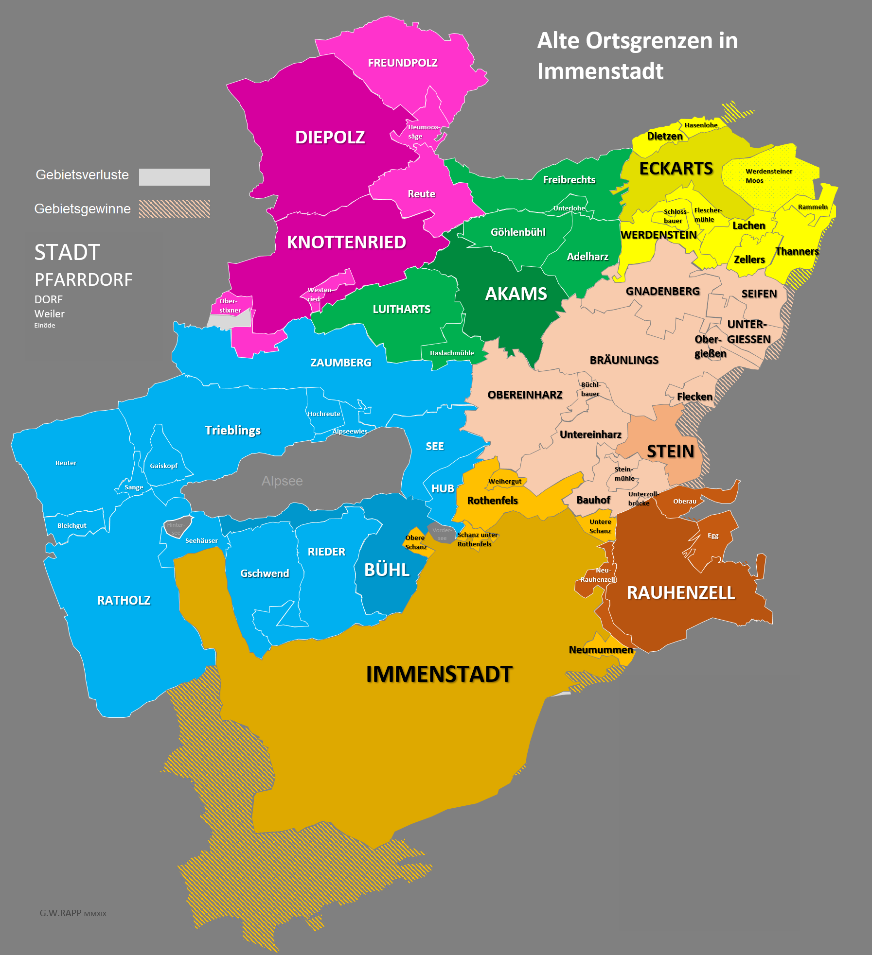 Darstellung der Grenzen von Einöden, Weilern, Dörfern und der Stadt im Gemeindegebiet Immenstadt